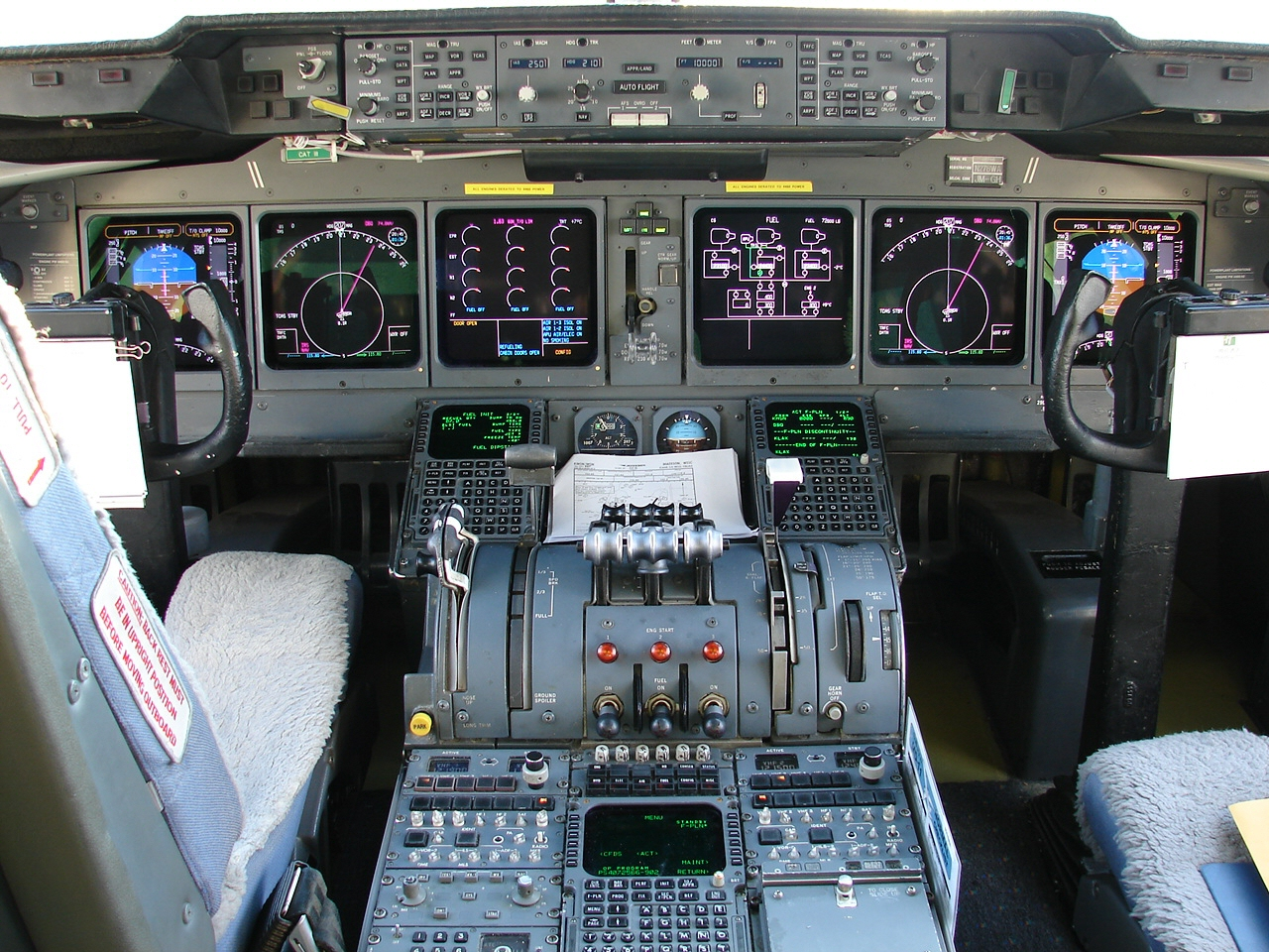 MD-11 Flight Deck